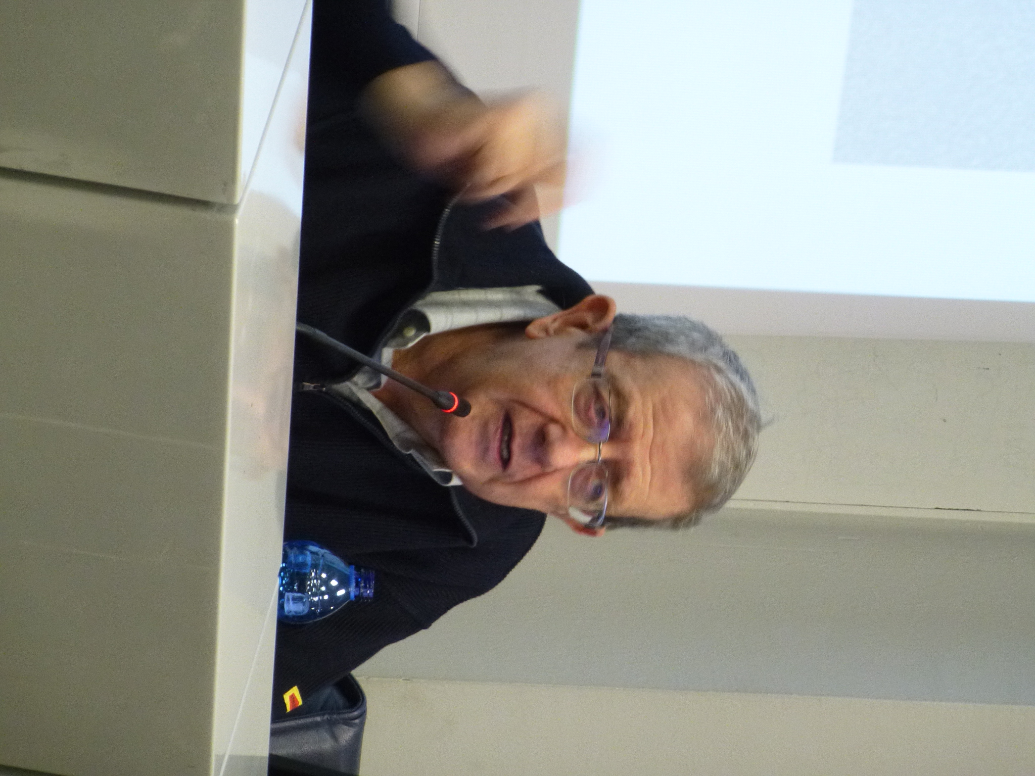 Lucio Russo al Politecnico di Milano, 14 maggio 2014